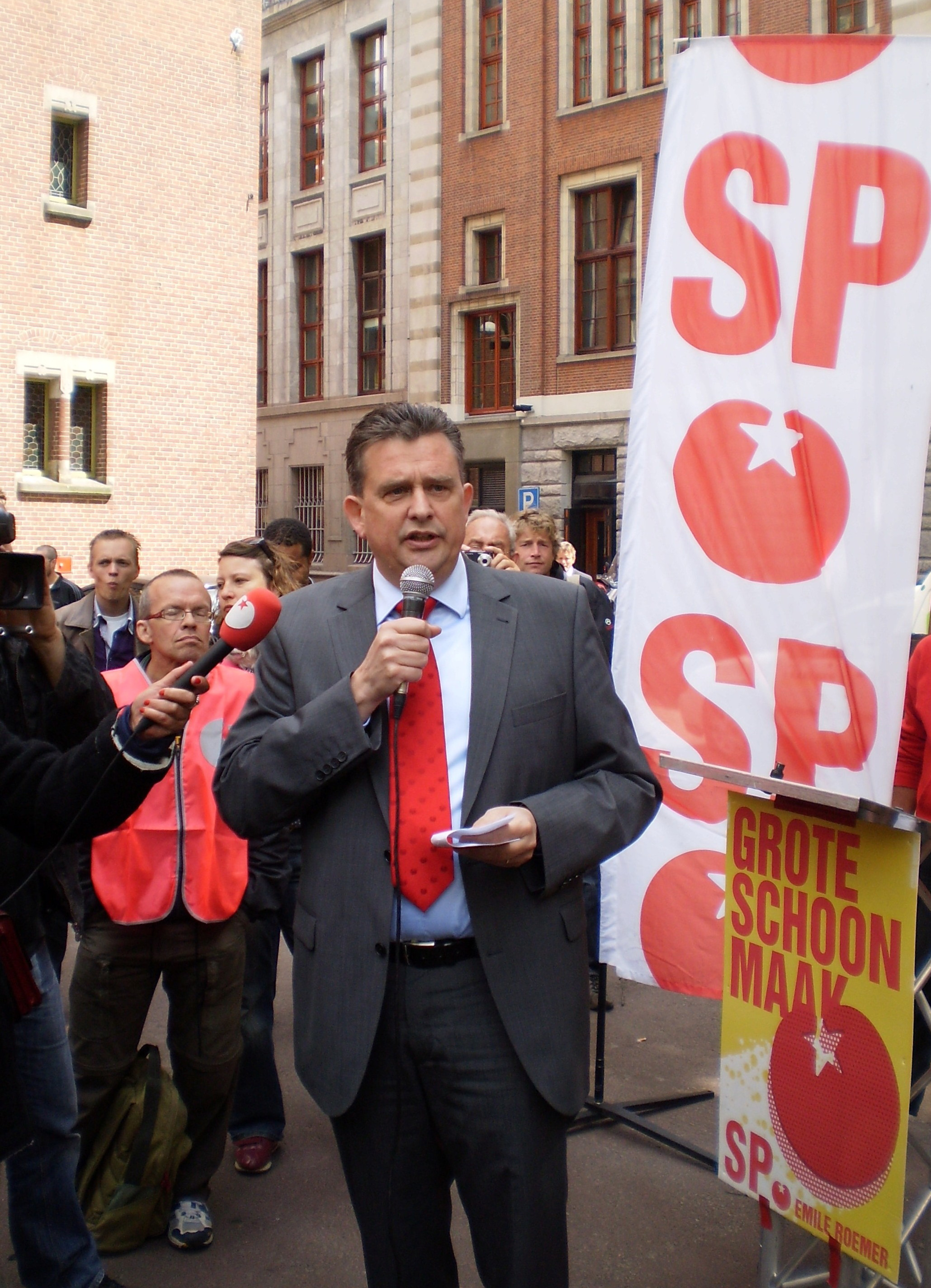 SP-lijsttrekker Emile Roemer op verkiezingscampagne op het Beursplein te Amsterdam